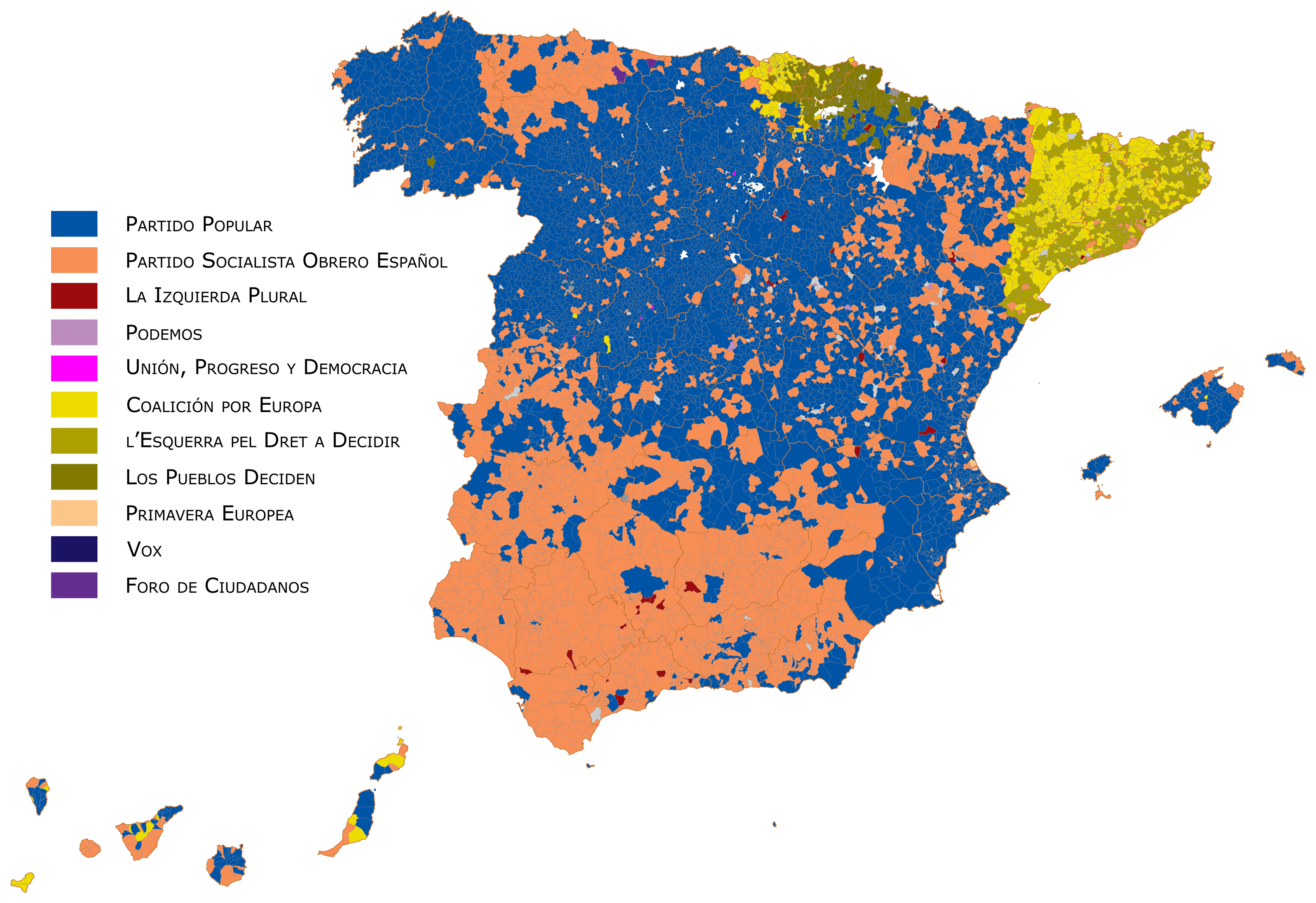 Elecciones Europeas 2014; resultados en España a nivel municipal